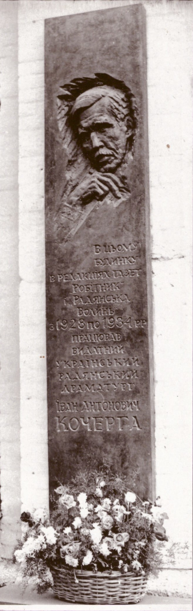 Український драматург Кочерга І.А. М. Житомир Житомирська область. 1981. Скульптор Таранченко В.О., архітектор Присяжнюк В.Ф. Меморіальна дошка. Склоцемент тонований. 200 х 50 х 12.